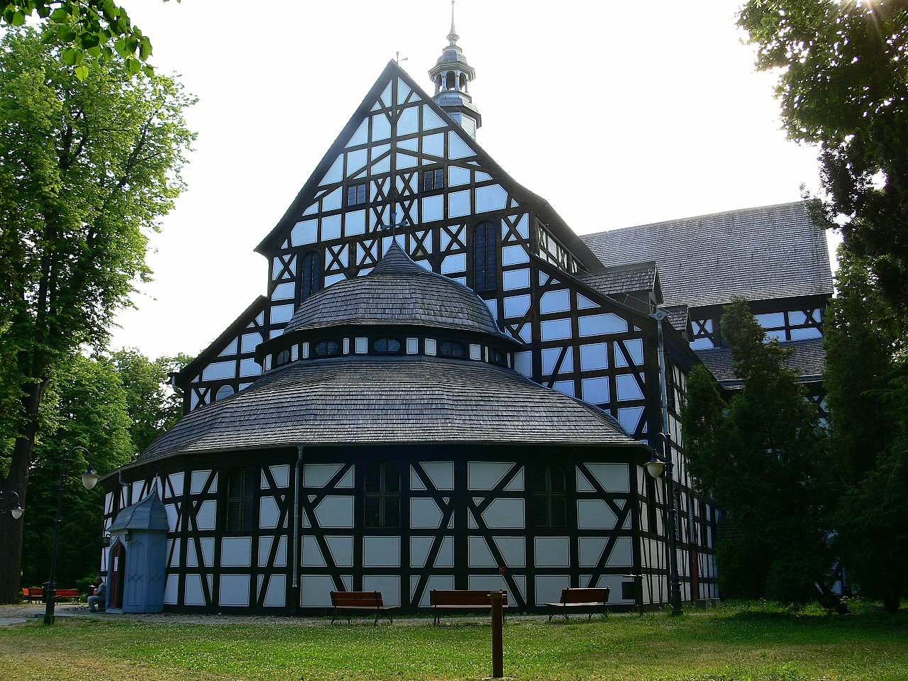 Świdnica - Kościół Pokoju